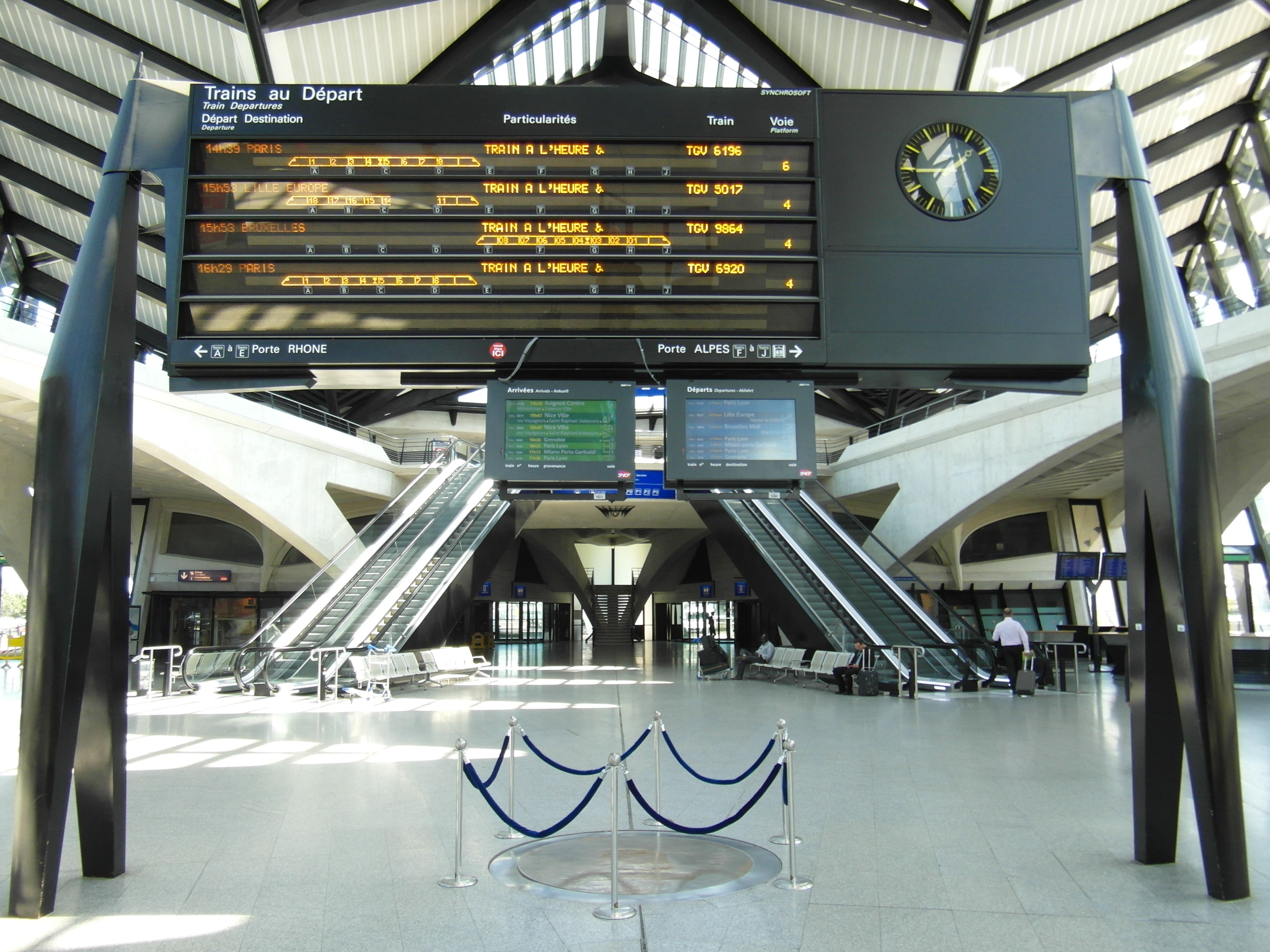 Lyon - Gare de Lyon-Saint-Exupéry TGV